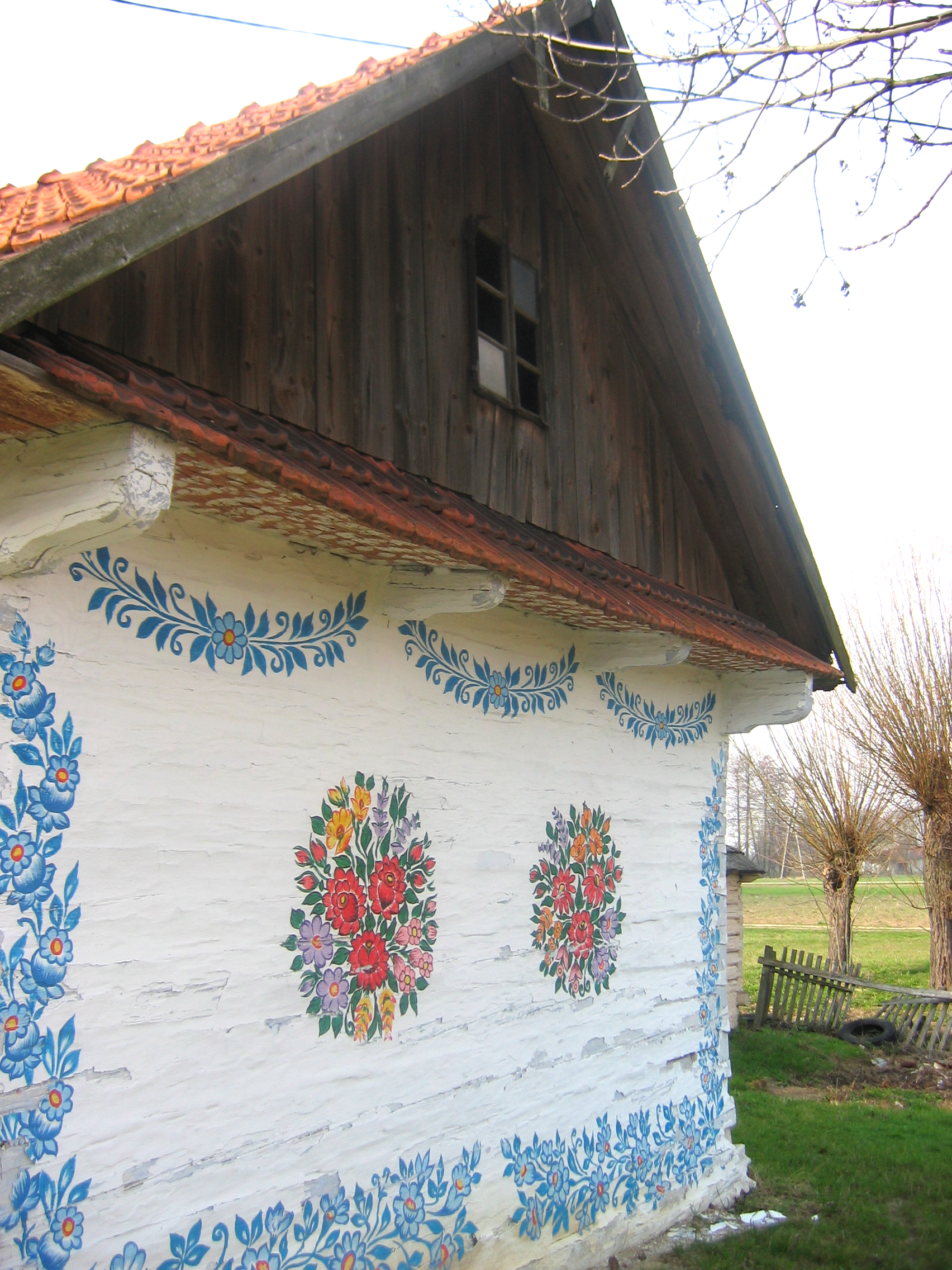 Polish illuminated cottage in Zalipie Małopolska